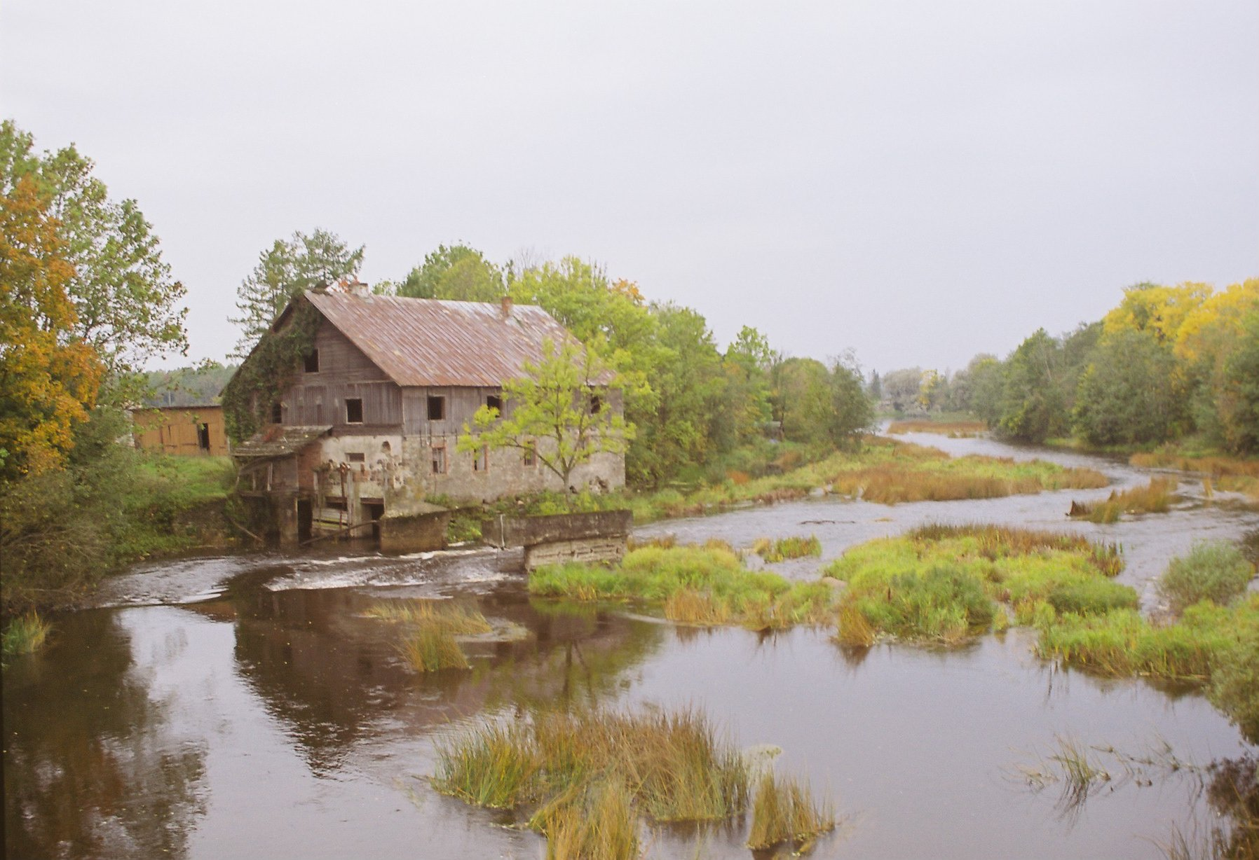 Pärnu jõgi vaade Suurejõe sillalt allavoolu